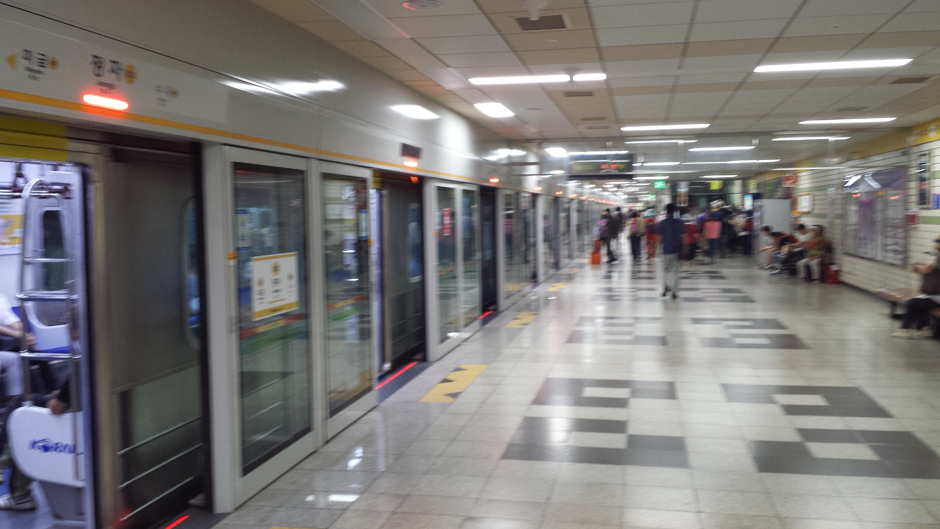 정자역 승강장